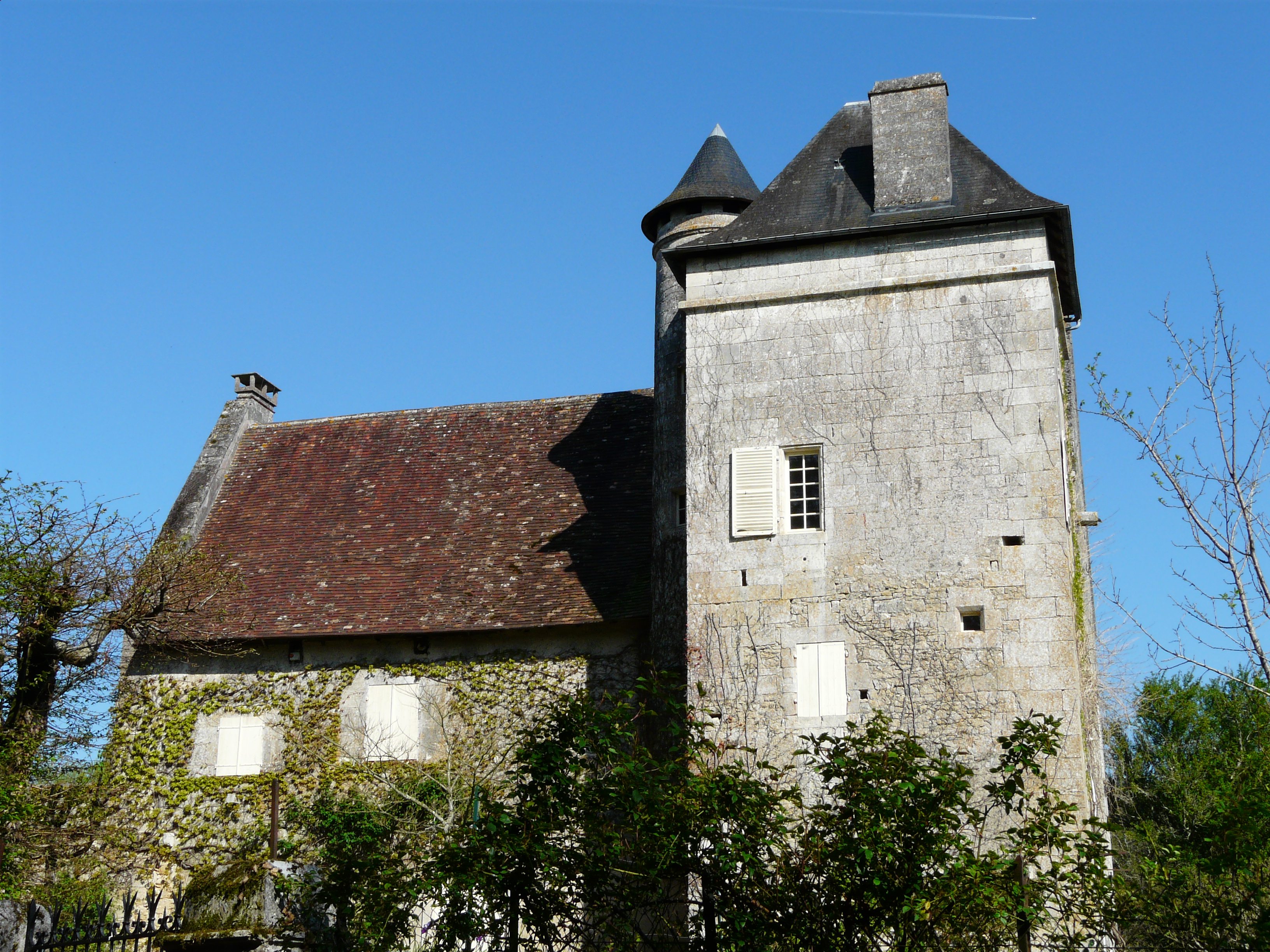 Le château de Pommier, Saint-Front-la-Rivière, Dordogne, France Object location45° 27′ 42.7″ N, 0° 43′ 36.1″ E